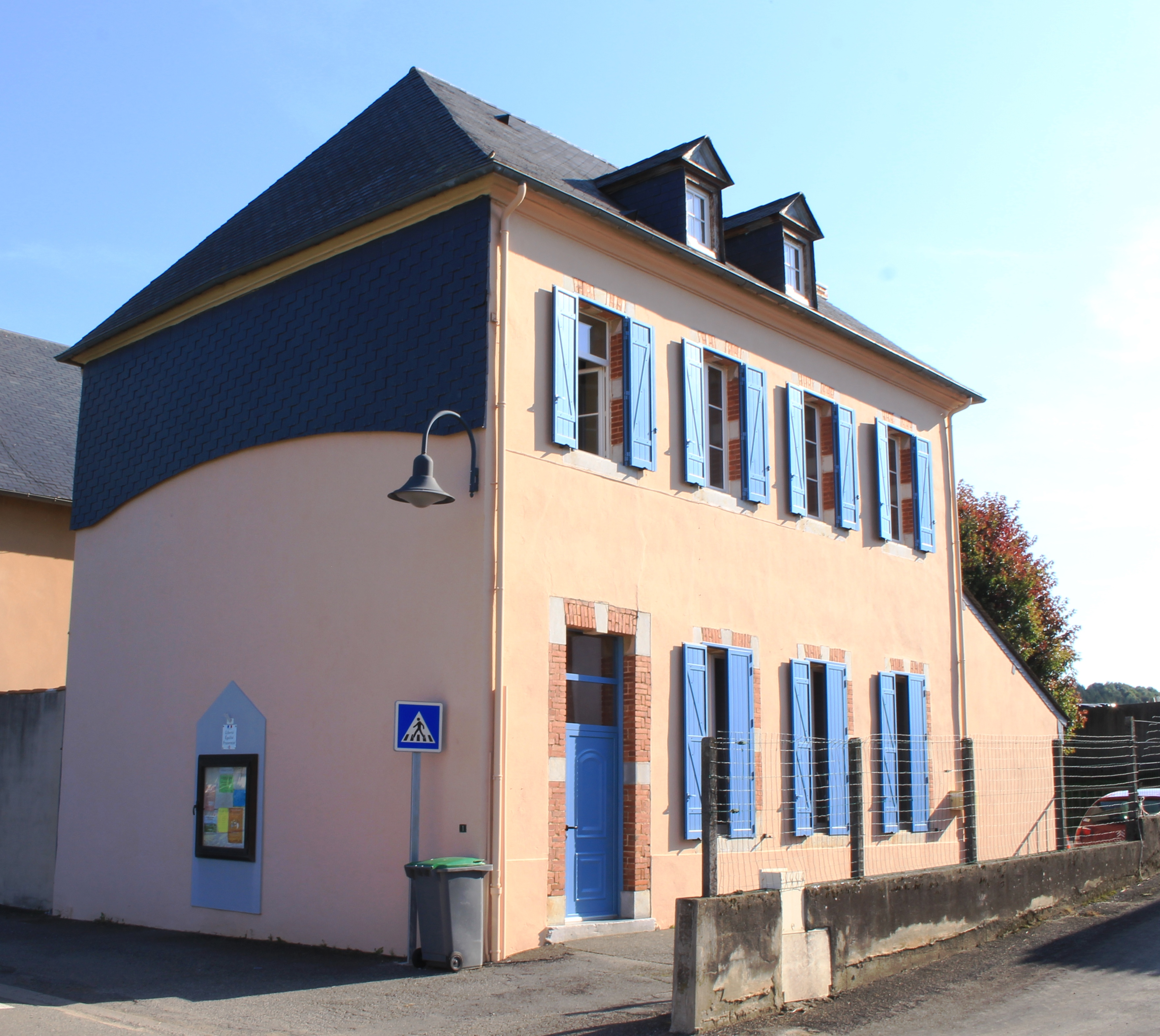 École de Loucrup (Hautes-Pyrénées)